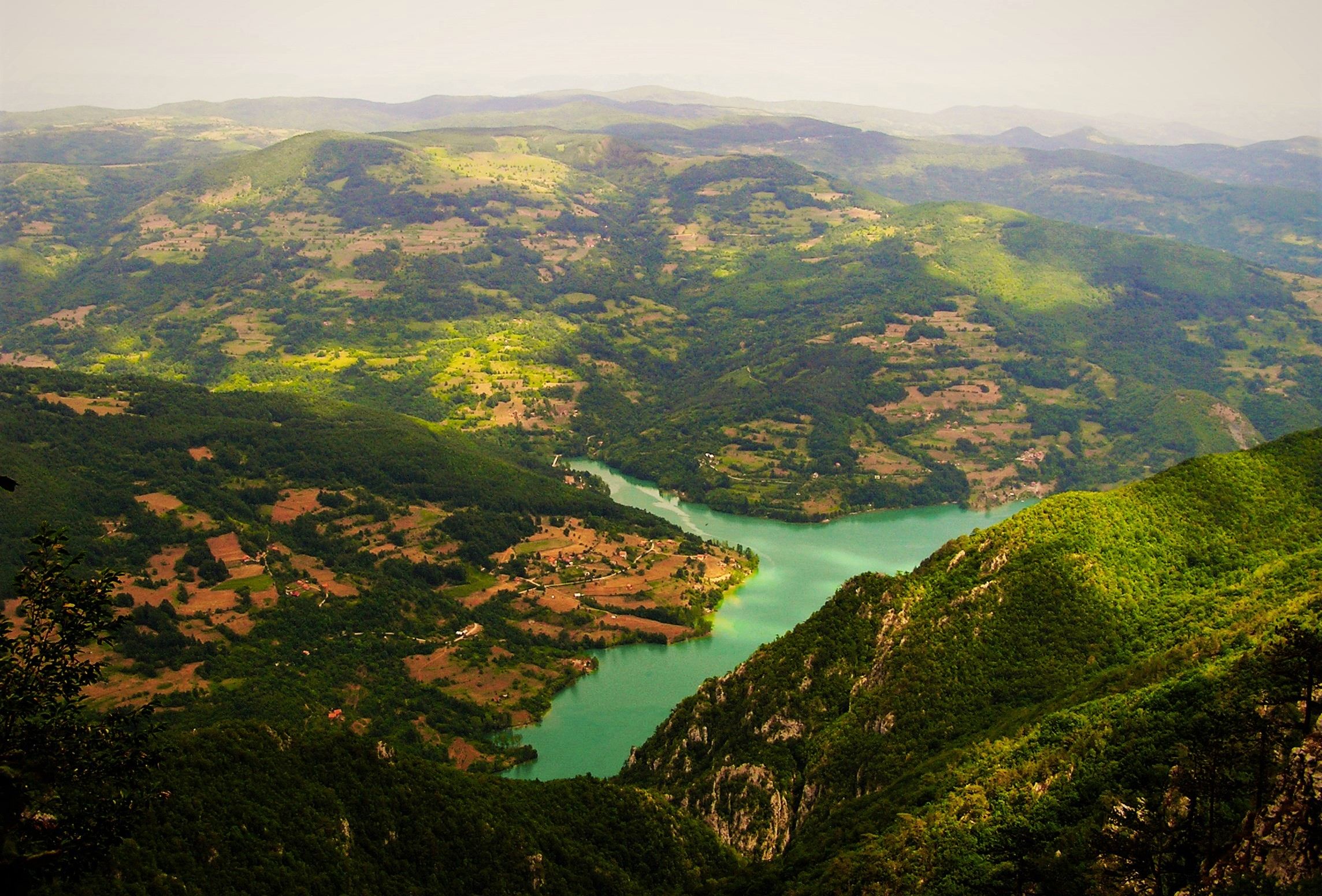 Ово је фотографија заштићеног природног добра у Србији под шифром: НП03This is a a photo of a natural area in Serbia with ID: НП03